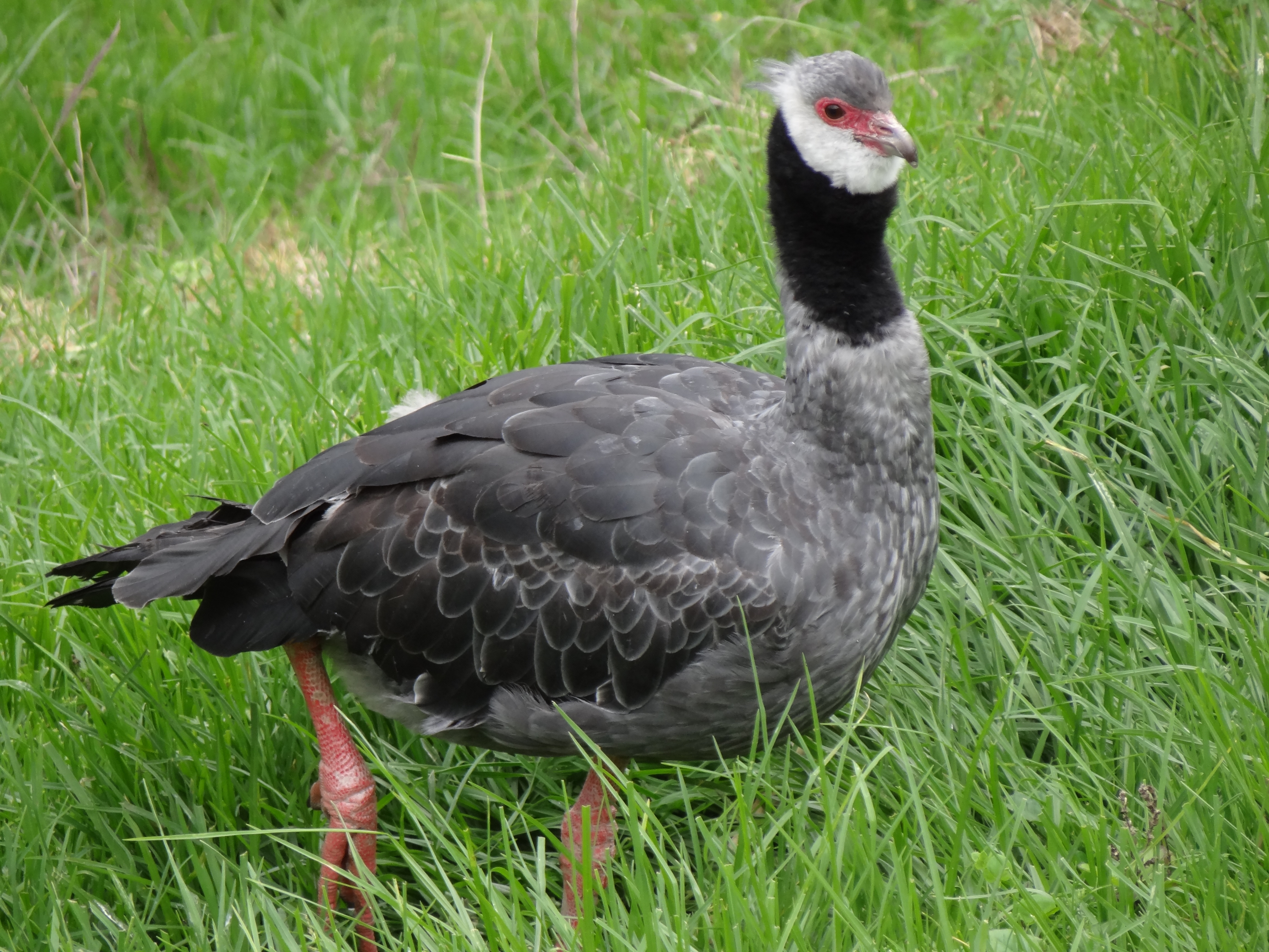 Chavarrí (Chauna chavaria) en el zoológico de Santacruz, Cundinamarca, Colombia.